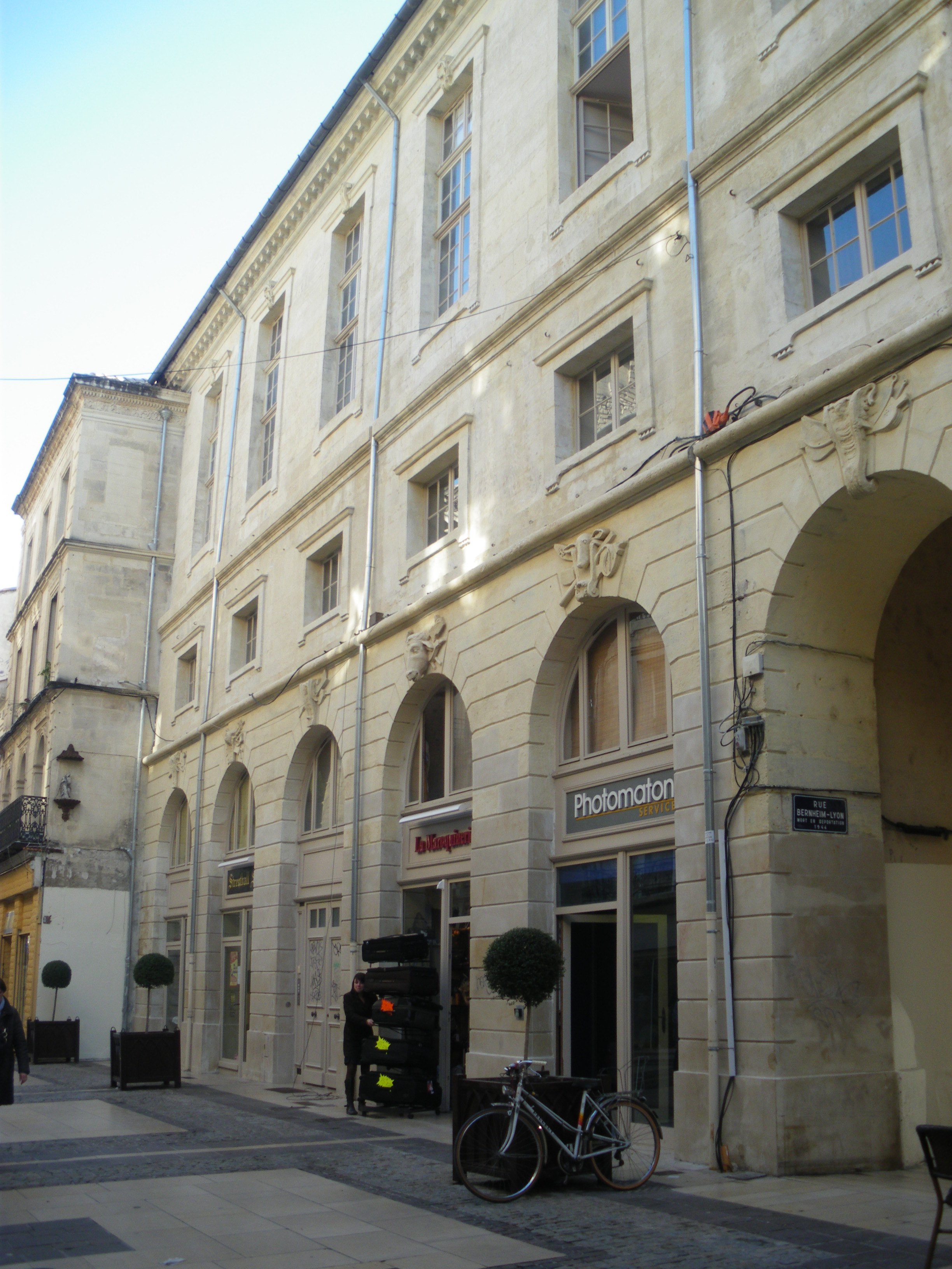 22 rue du vieux sextier à avignon, avec facade sculptée